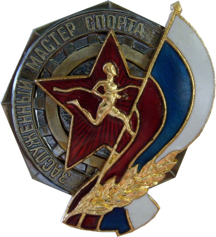 Знак к почётному спортивному званию «Заслуженный мастер спорта России»